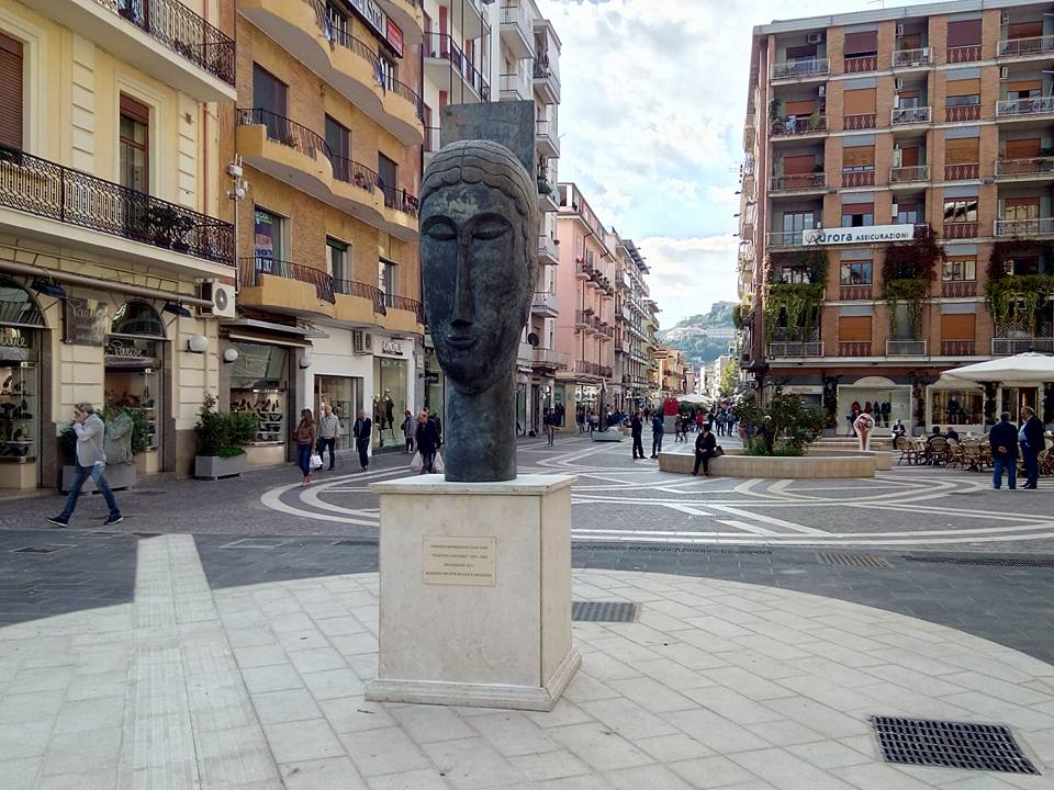 Opera di Amedeo Modigliani nel Museo all'aperto Bilotti sull'isola pedonale di Corso Mazzini a Cosenza